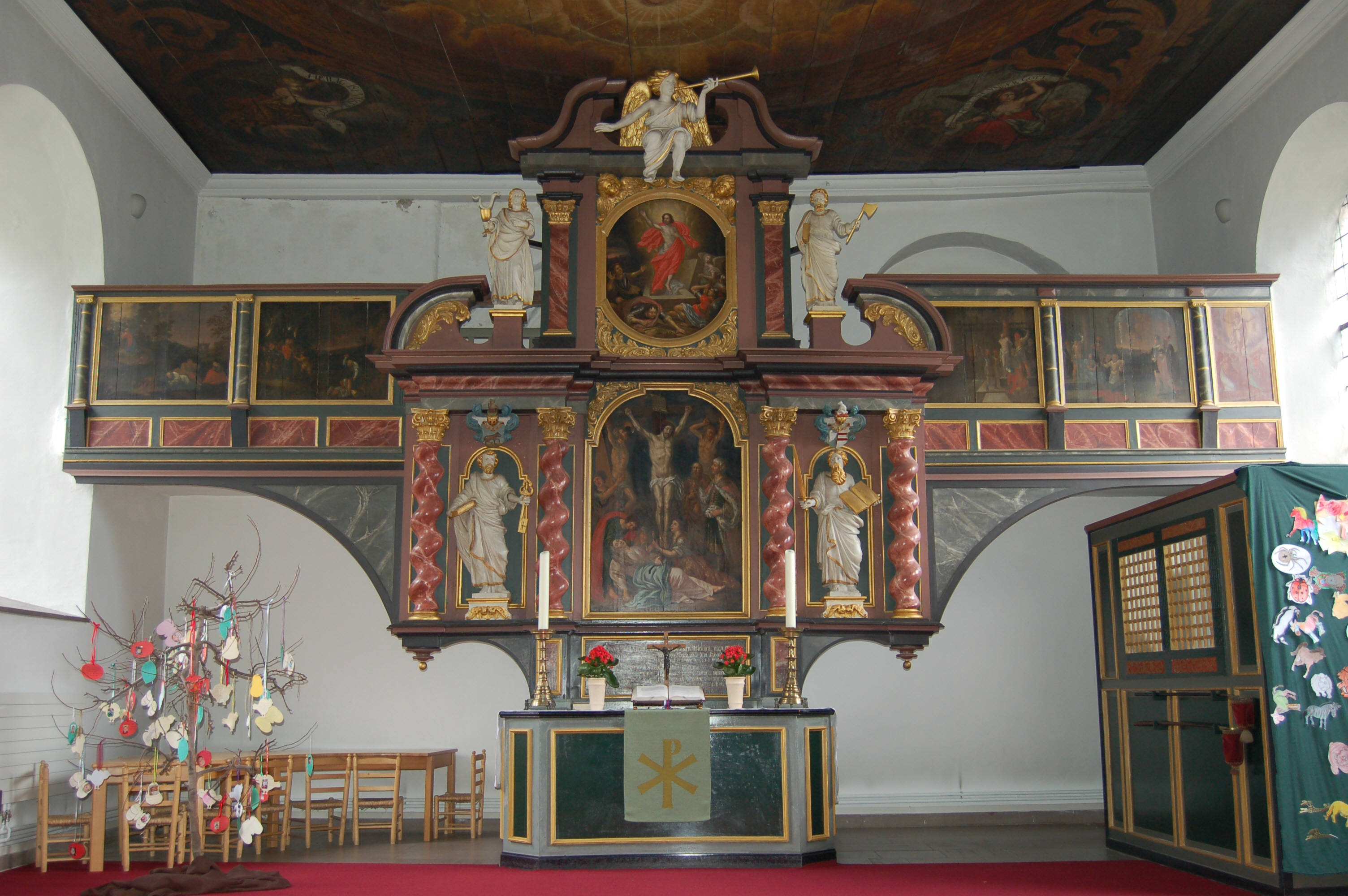 Der Christian-Precht-Altar aus der Zeit vor 1685. Die vier großen Bilder stammen von den Hamburger Maler Paul Forkel.